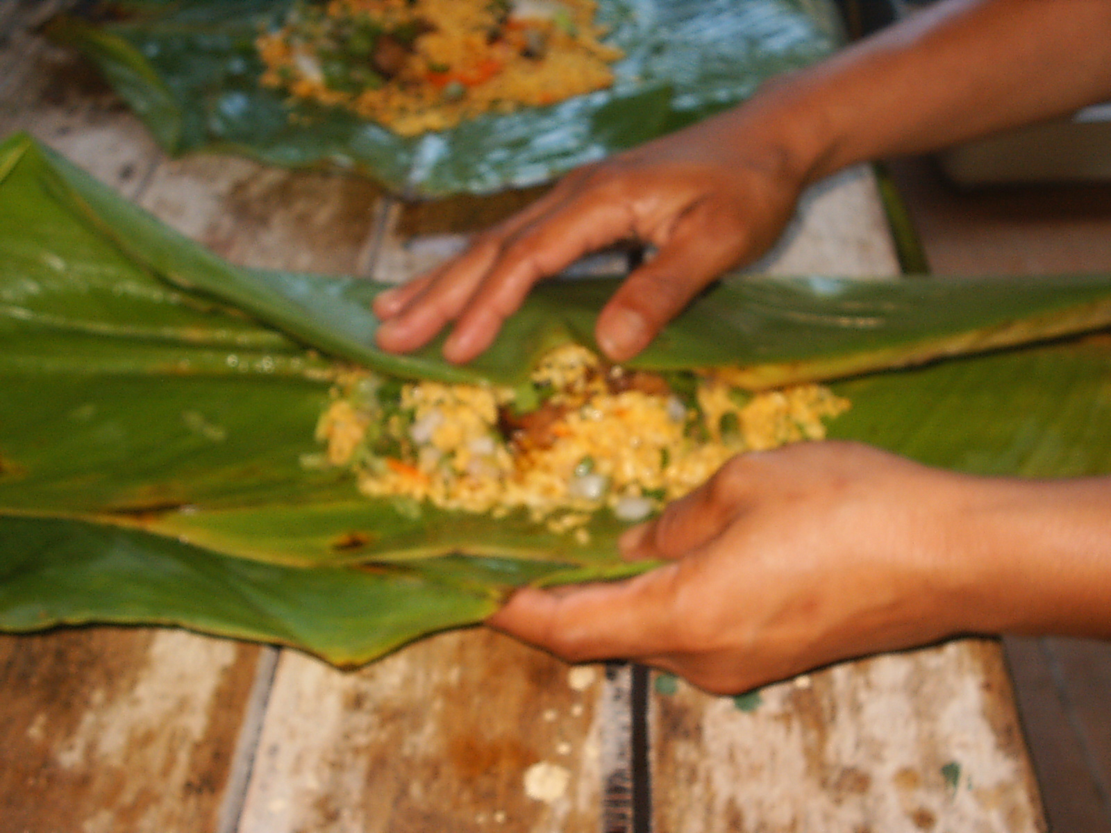 Elaboración de pasteles o tamales de conejo